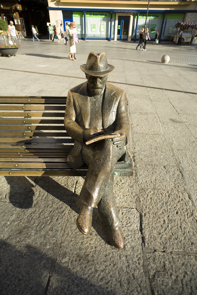 Antonio Gaudi, Spain